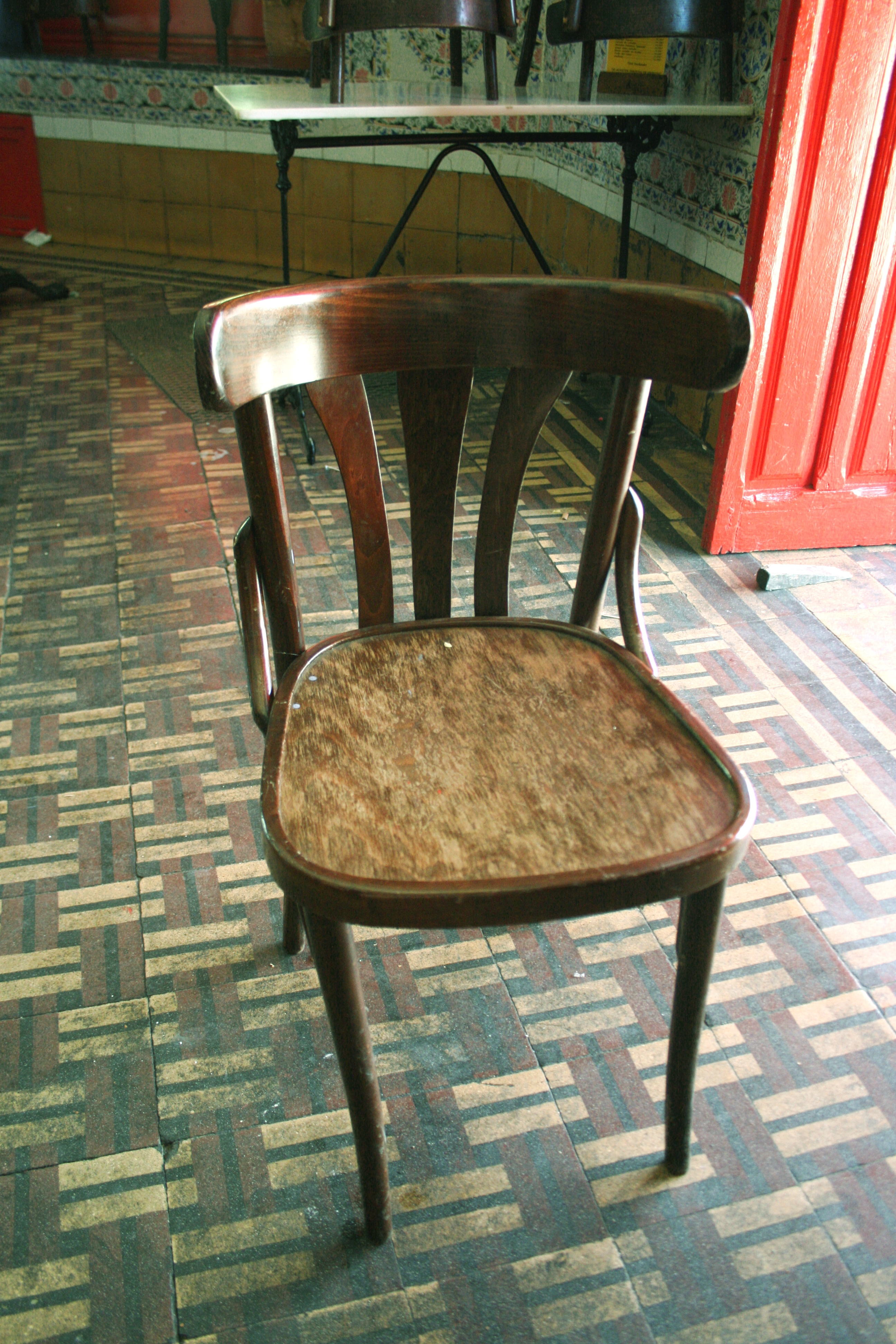 Silla del "abuelo"